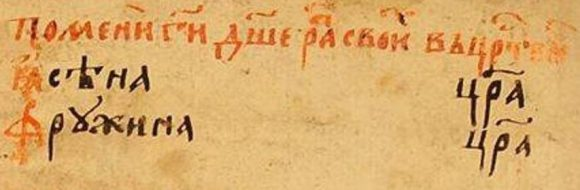 откъс от Боянския поменик, който е датиран между 1562 г. и 1612 г. Написан е в Драгалевския манастир „Света Богородица Витошка“ от монаха граматик Йов Касинец (Шишатовец) от Темешвар. В този документ под раздела “Помени Господи душе рабов своих в царствие” като последни български царе са посочени “Асена цара” (явно тук се има предвид Константин II Асен) и “Фружина цара”.